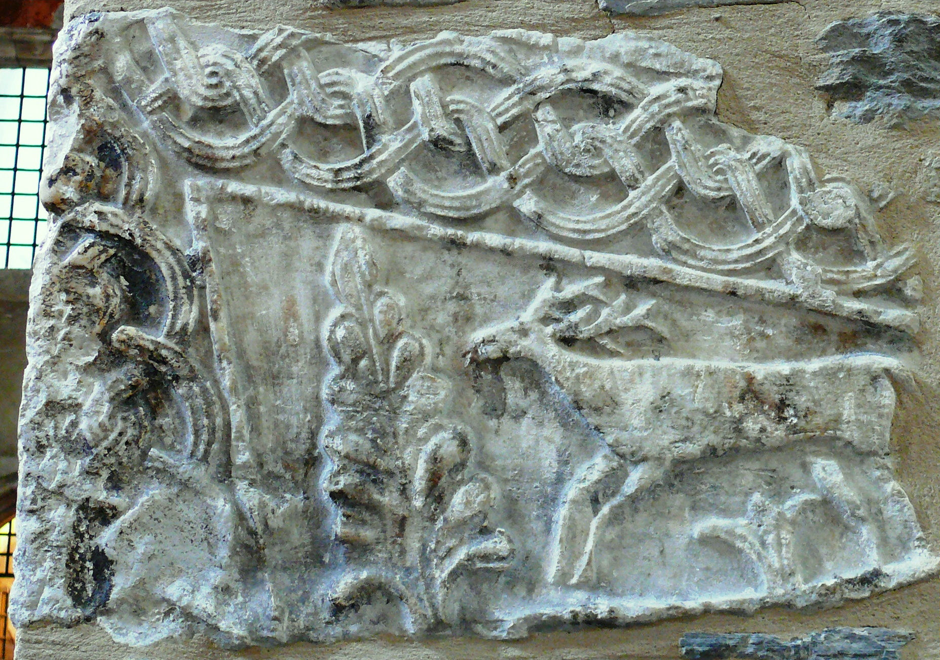 Cathédrale Saint-Jean-Baptiste de Saint-Jean-de-Maurienne - Réemploi d'éléments carolingiens dans le 5ème pilier nord